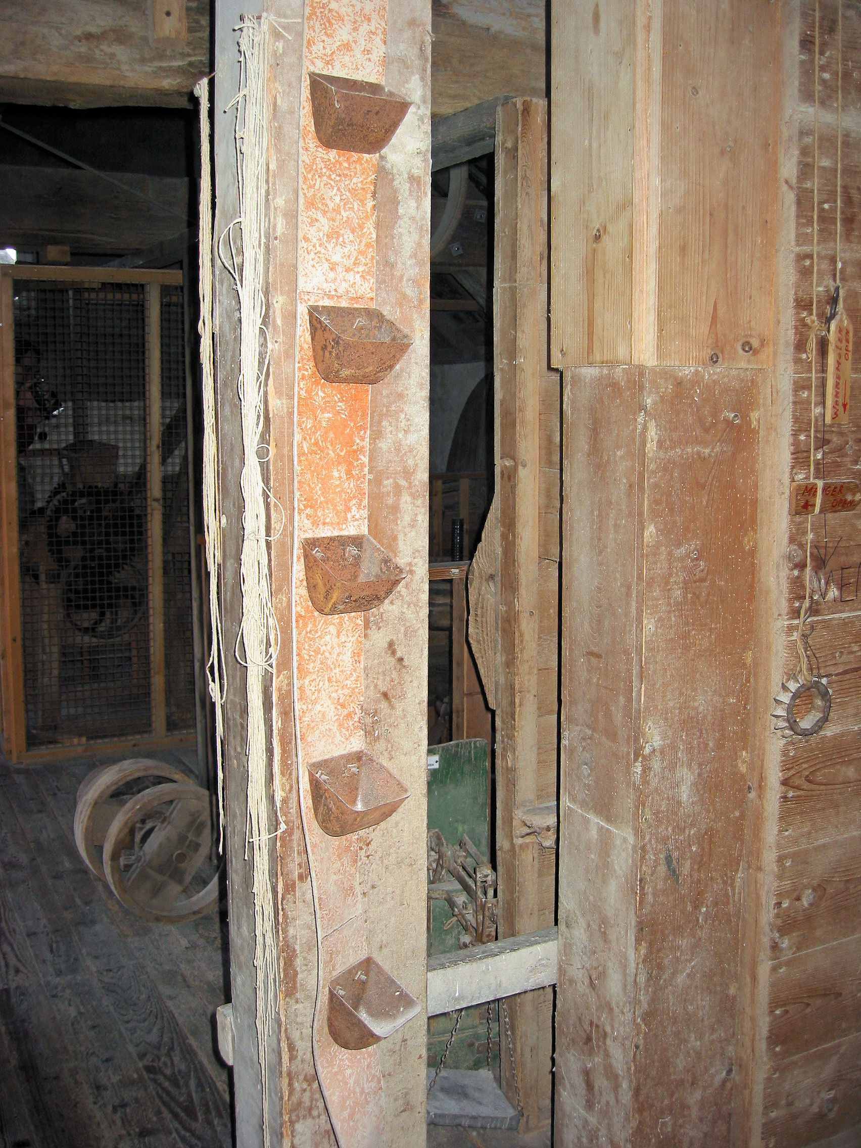 Venemansmolen, Winterswijk, jacobsladder